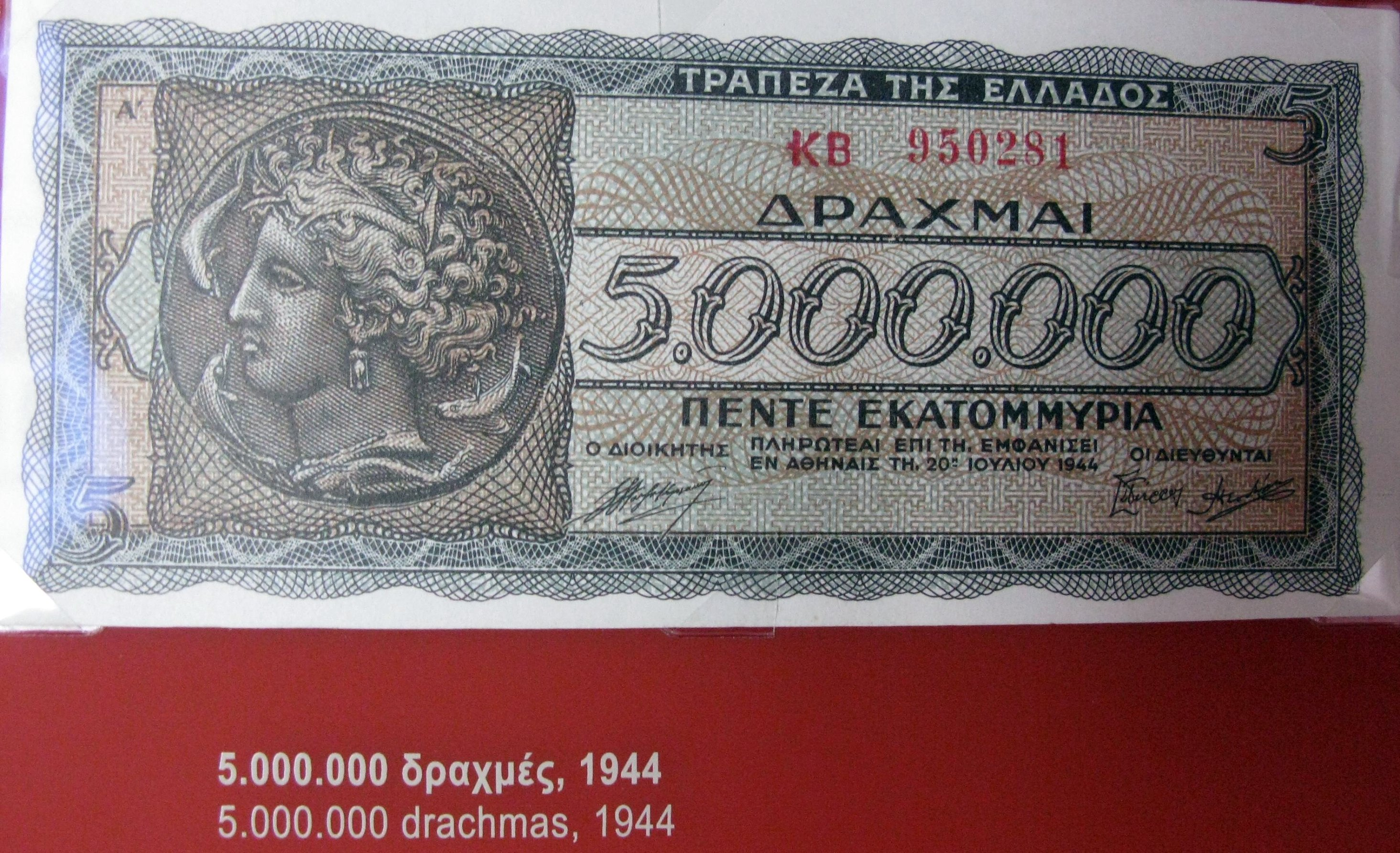 Numismatic Museum, Athens, Greece. --- 5.000.000 δραχμές, 1944 Νομισματικό Μουσείο, Αθήνα.